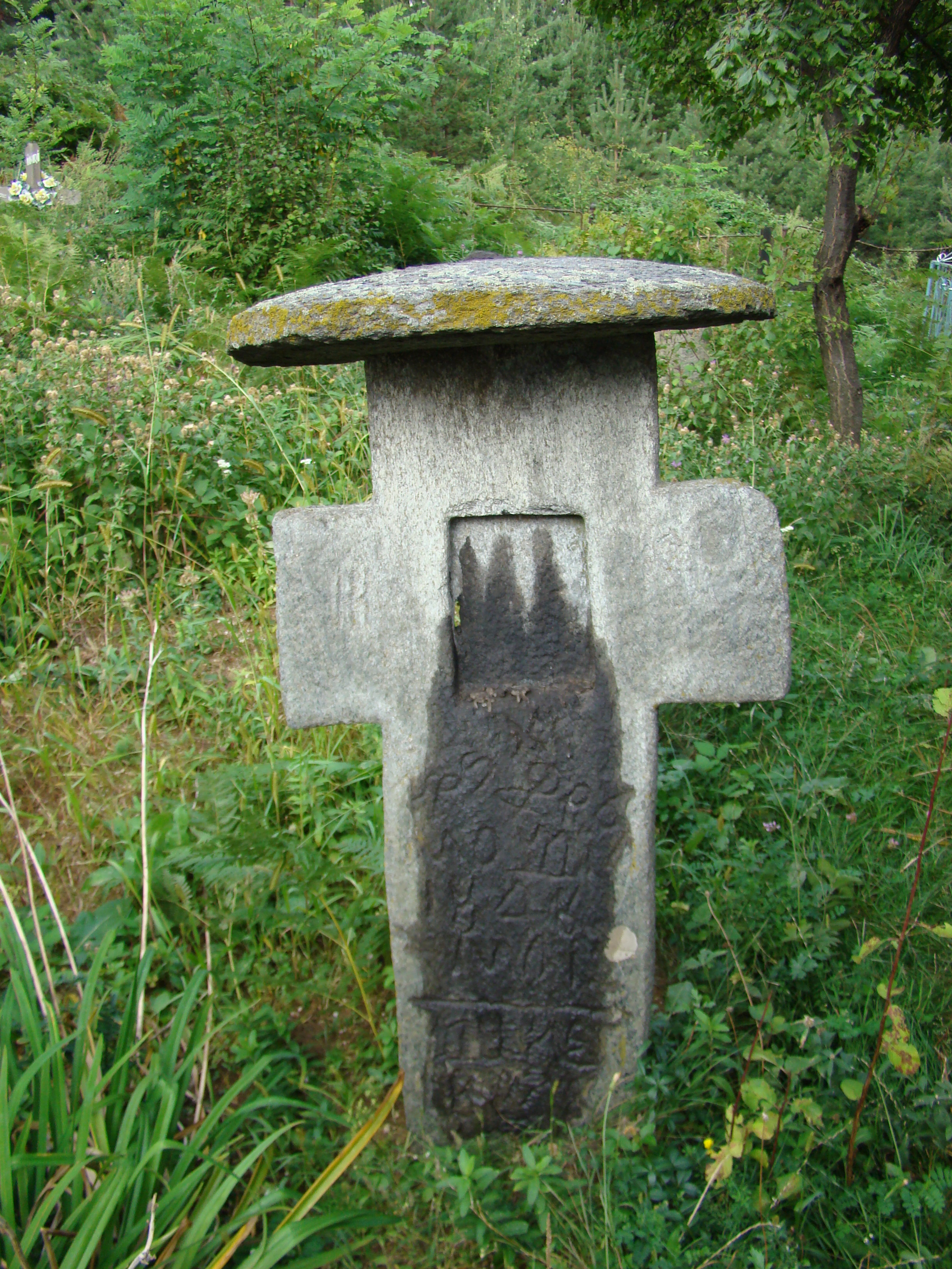 Biserica de lemn „Sf.Dumitru” din Schela-Cornet, județul Gorj